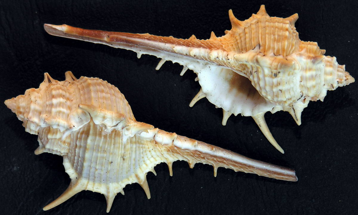 self made.